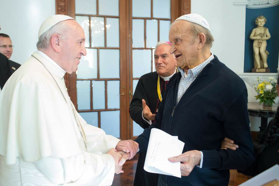 El sacerdote Ugo de Censi con el Papa Francisco en la Nunciatura de Lima. (Enero de 2018)